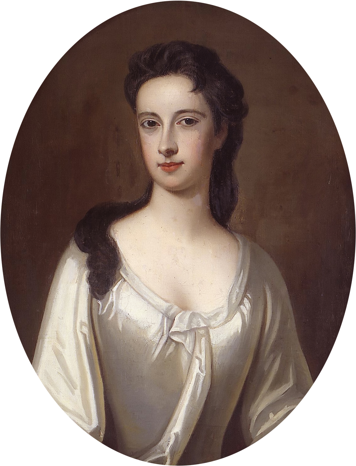 Charlotte van Nassau-Odijk (1677-1715), echtgenote van Willem Maurits (1679-1753), graaf van Nassau-Lalecq, veldmaarschalk van de Staten-Generaal